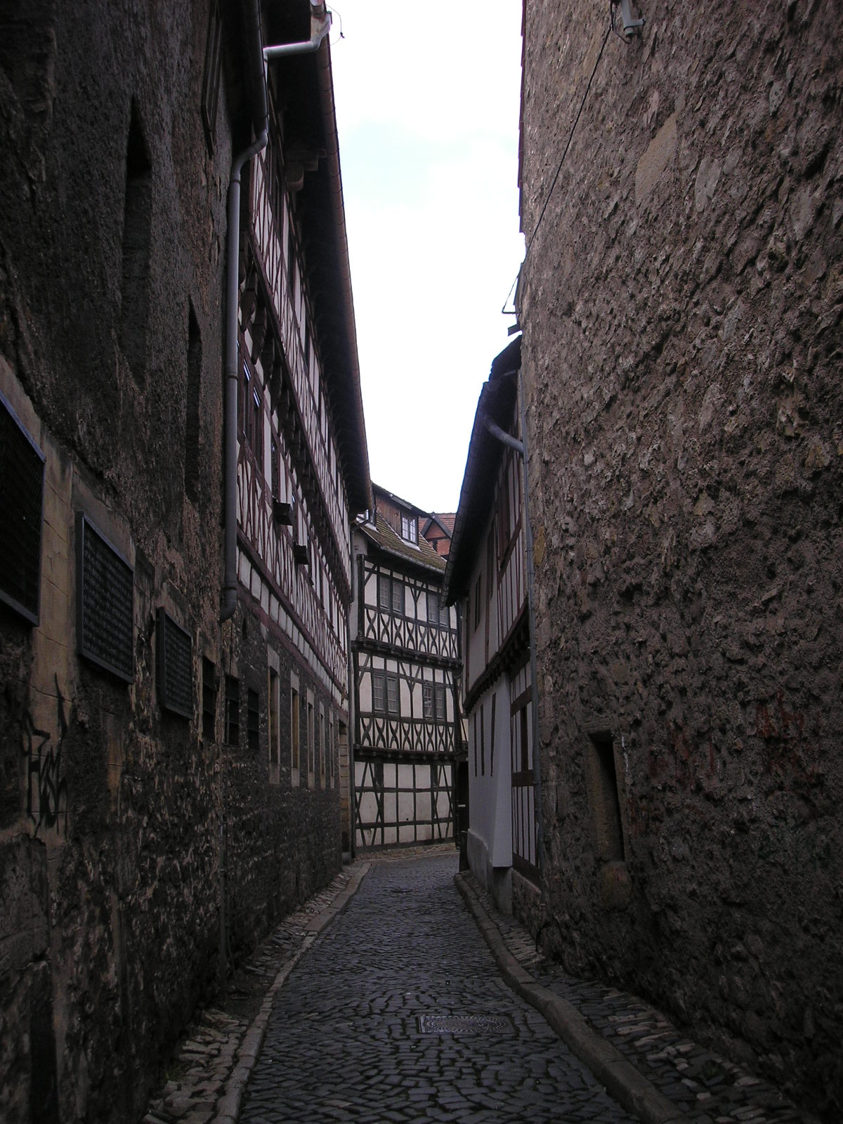 Blick durch die Waagegasse zwischen den ehemaligen Speicherhäusern der Altstadt in Erfurt (Thüringen).